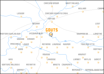 autour de Gouts, Landes, France